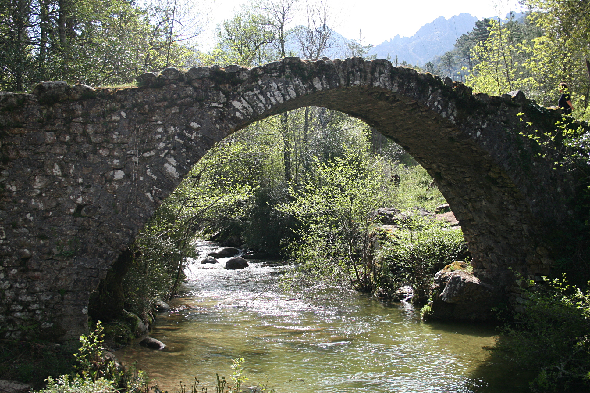 Pont de Zippitoli (Classé)